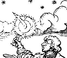 Holzschnitt mit Abbildung eines Mannes mit einem Horometrum